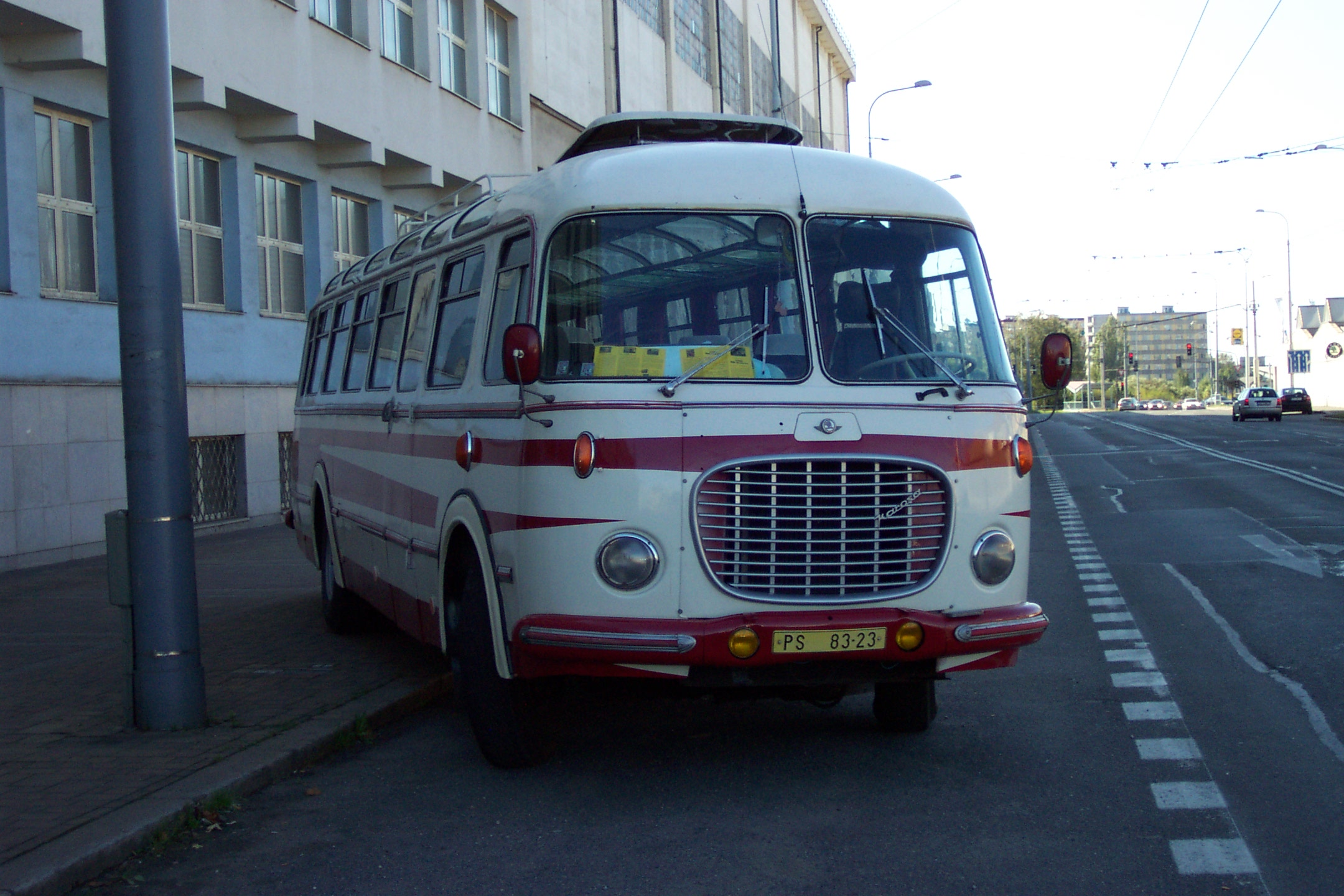 Plzeň, the historical bus type 1961 Škoda RTO in front of the Škoda factory - Plzeň, historický autobus typu Škoda RTO před továrnou Škoda v Plzni